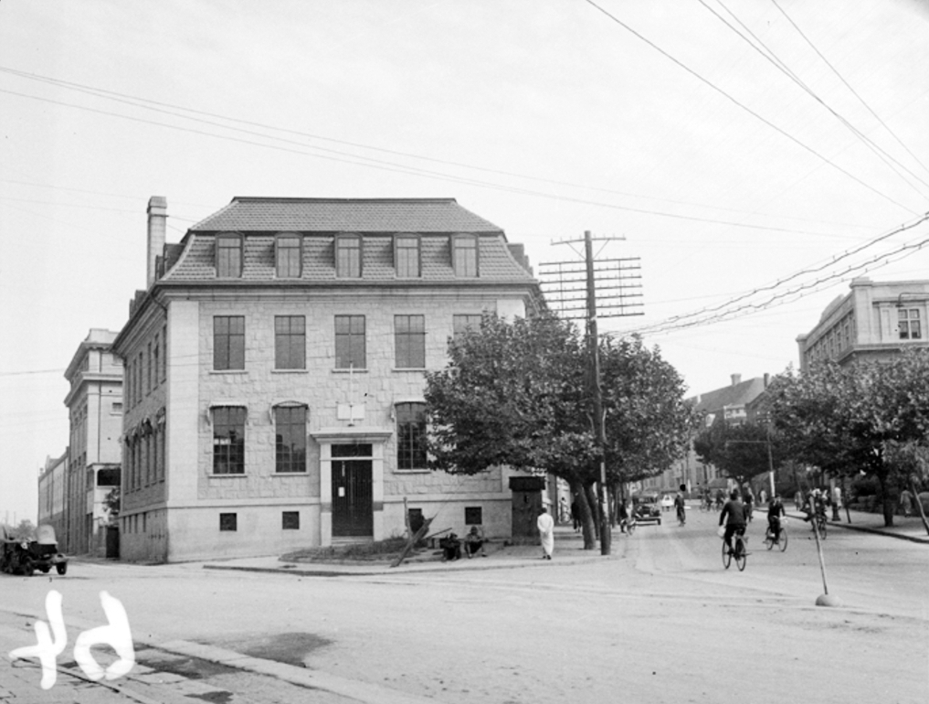 青岛太古洋行旧影